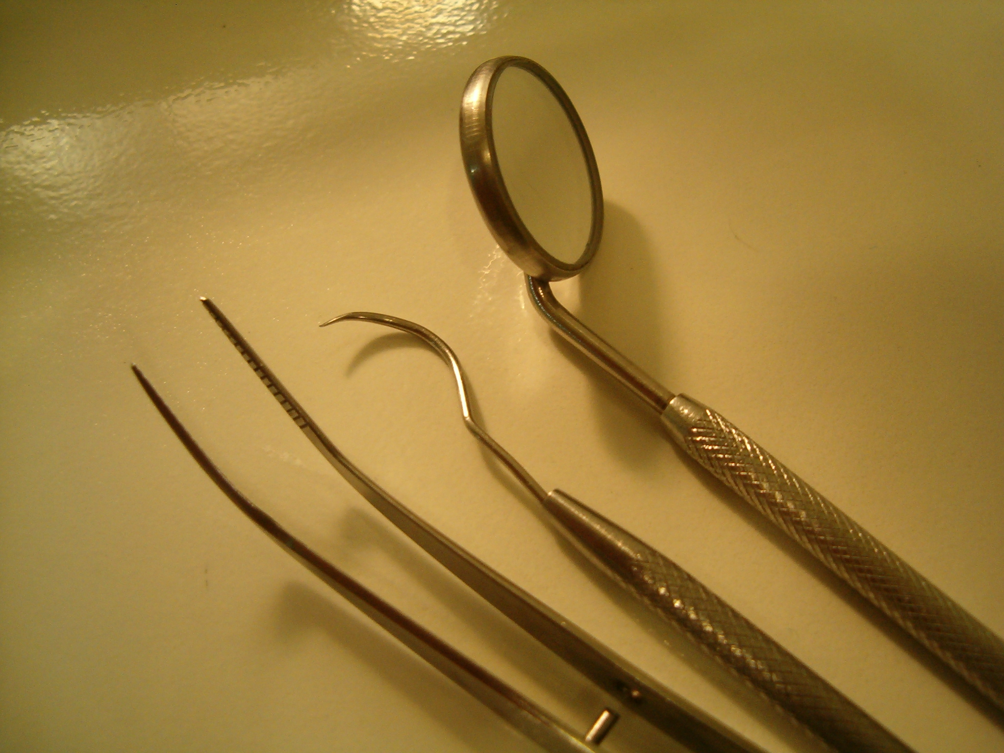 Instrumental clínico de uso do Cirurgião-Dentista: Espelho, sonda exploradora e pinça